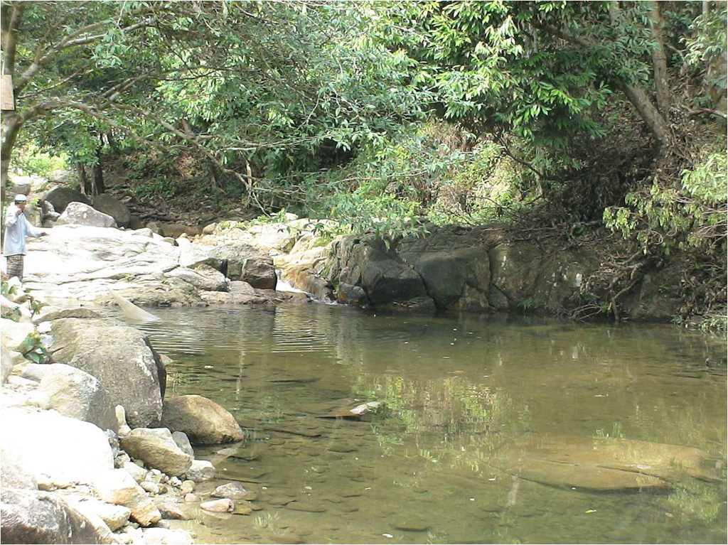 Jeram Mengaji / Jeram Mak Nenek ini baru dibuka pada tahun 2005, dan masih dalam pembangunan. Ia terletak lebih kurang 6 km dari Pekan Selising atau 22 km dari Bandar Pasir Puteh. Jeram ini bakal dibangunkan sebagaimana Jeram Pasu dan Jeram Linang. Ia terletak di kawasan pedalaman dan belum diketahui oleh orang ramai. Jeram ini sesuai untuk aktiviti keluarga dan riadah hujung minggu. Jeram ini akan dibangunkan sepenuhnya untuk kunjungan orang ramai agar ia dapat menjadi salah satu pusat rekreasi yang sedia ada dan dikenali umum.